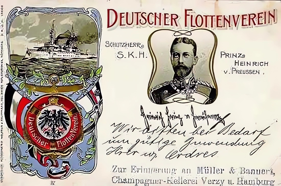 Postkarte zur Werbung für den Deutschen Flottenverein 1902